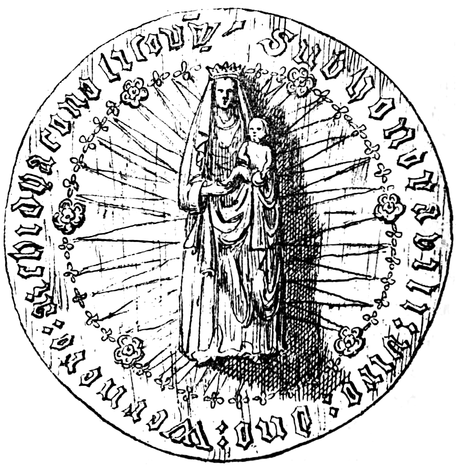 Mariabild av ek i Nykils kyrka, Östergötland. Teckning i "Utdrag af Antiqvitets-Intendenten P. A. Säves afgifna berättelse för år 1861", publicerad i Antiqvarisk tidskrift för Sverige band 1, 1864.